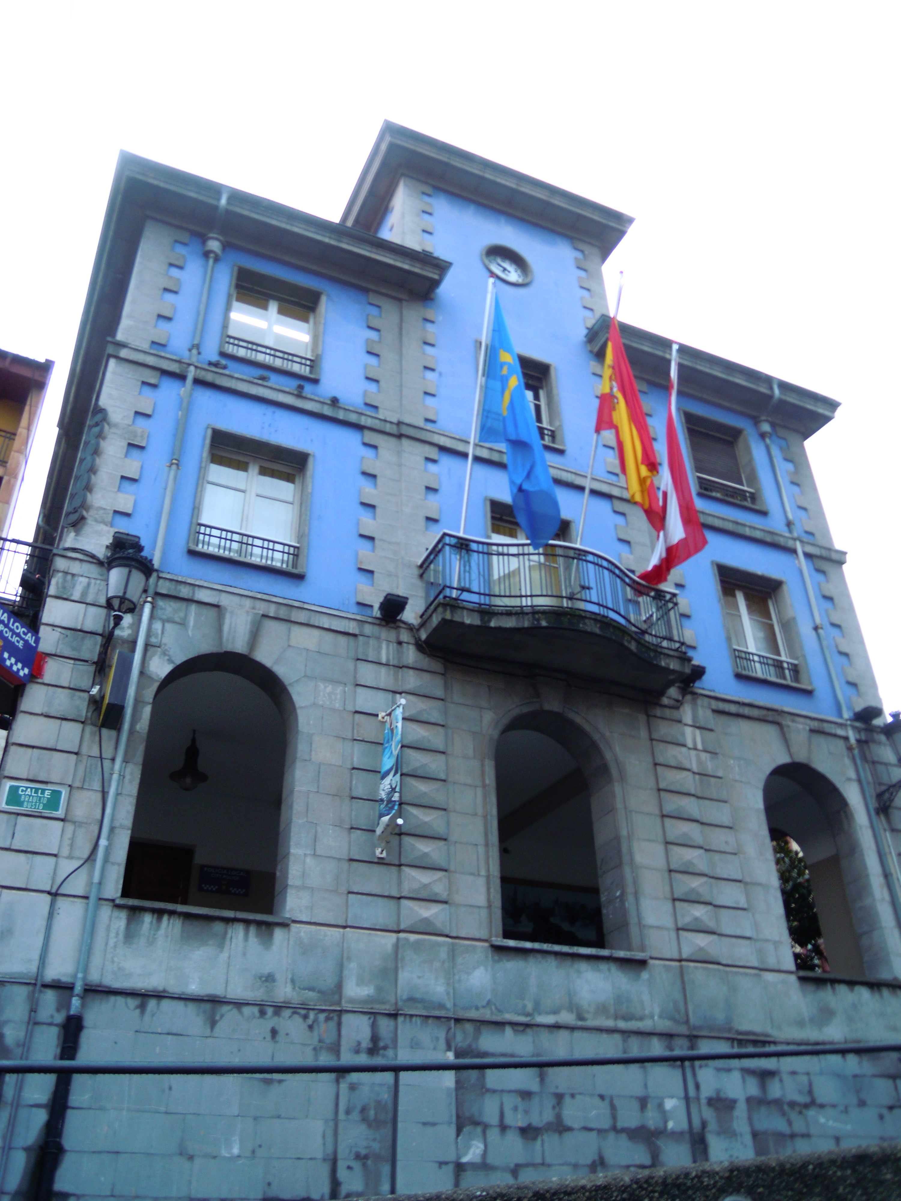 Ayuntamientu Candás